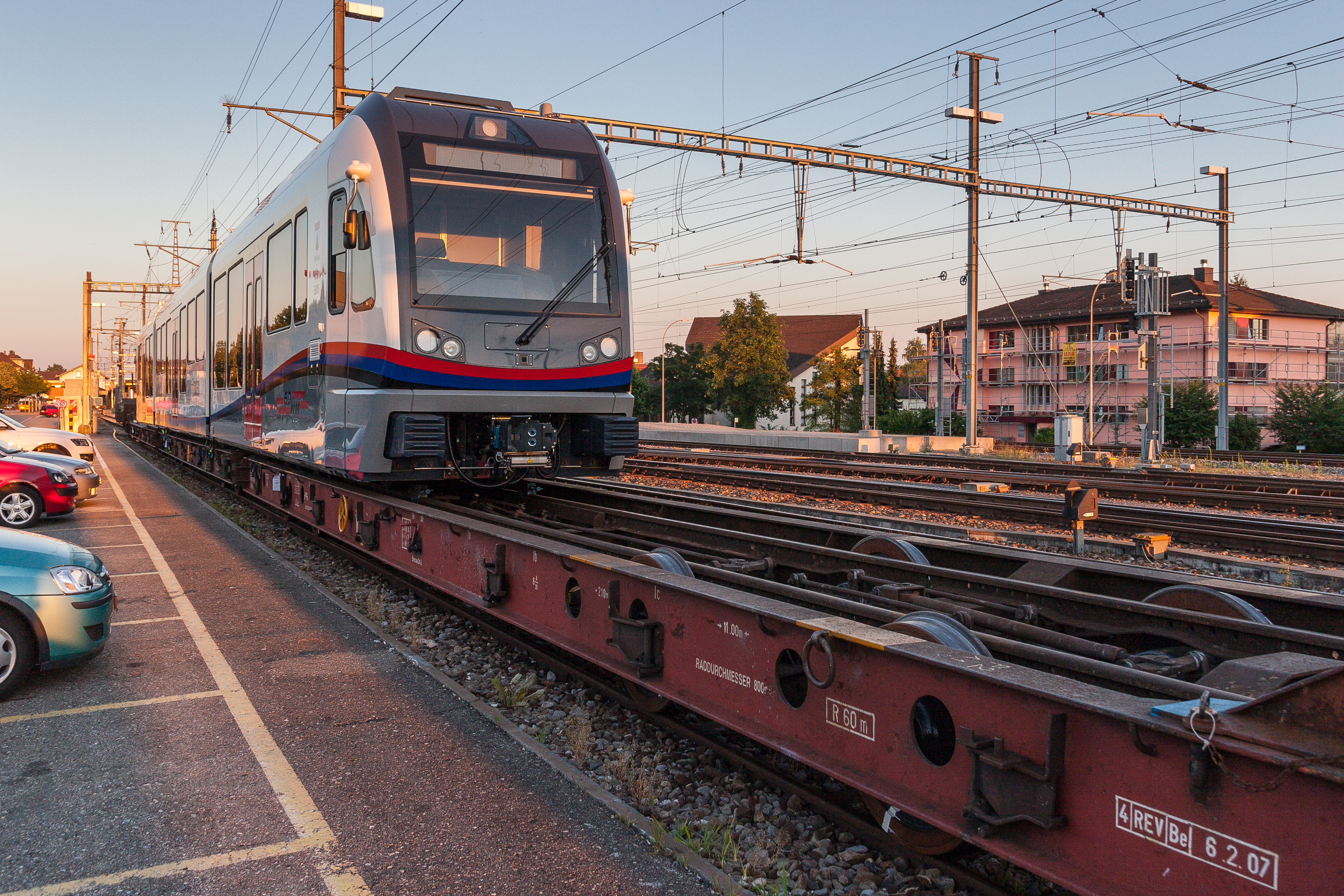 Rollschemel (Rollwagen) mit Schmalspurzug ABe 4/8 Nr. 5005 der BDWM